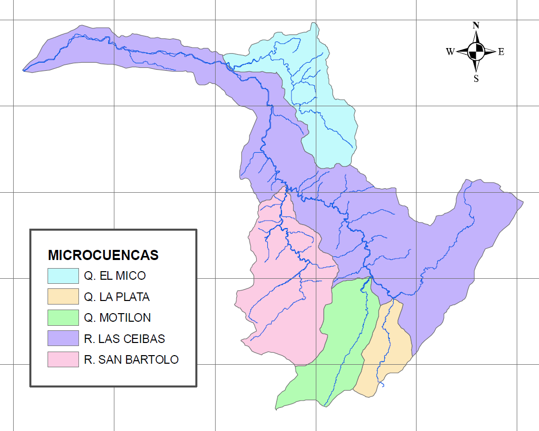 Mapa de las microcuencas del río las Ceibas, en Neiva, Colombia.